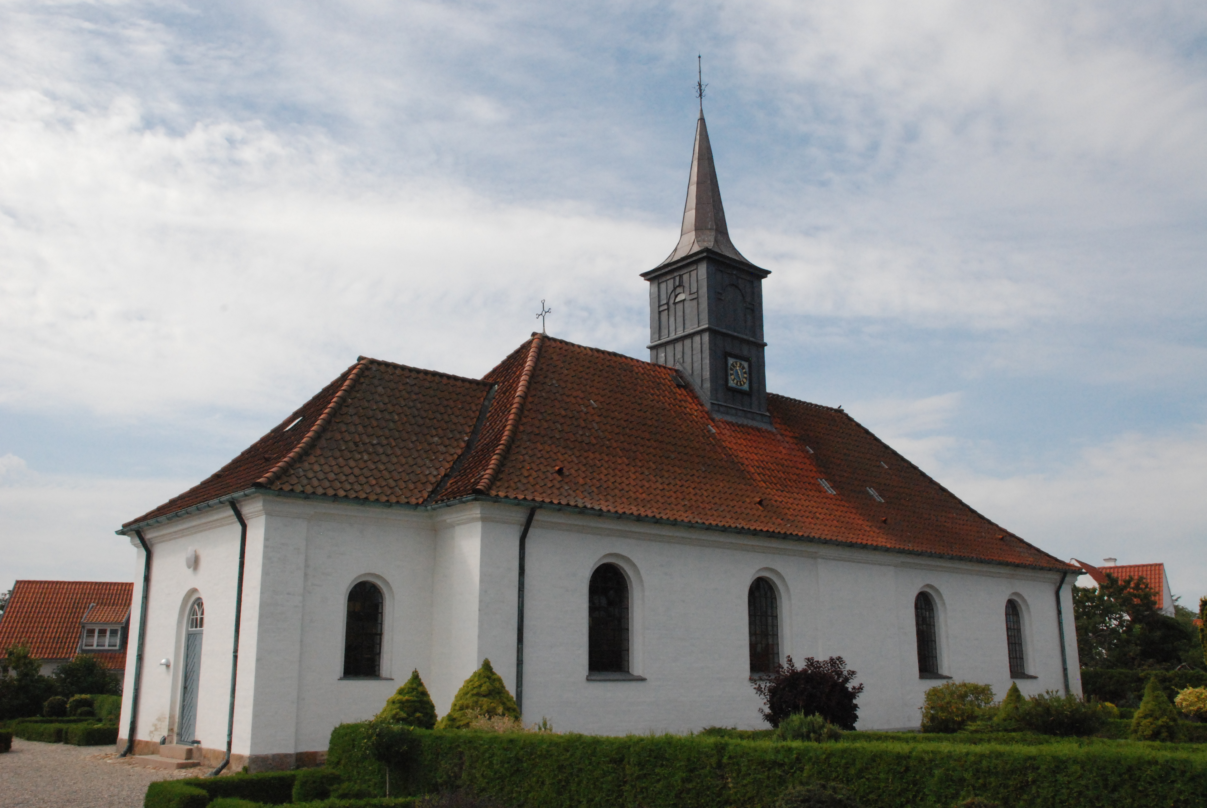 Hornbæk Kirke, Hornbæk Sogn, Lynge-Kronborg Herred, Frederiksborg Amt, Danmark.